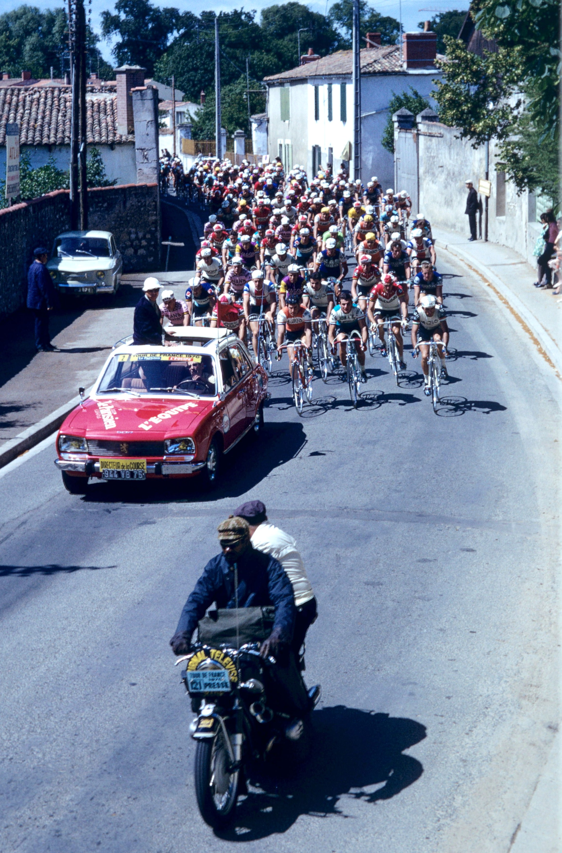 Tour de France cycliste 1970, seconde étape La Rochelle-Angers. Juste après le départ, les coureurs cyclistes passent rue Marius Lacroix en face du n° 51. Au premier plan on aperçoit la moto du journal télévisé qui est suivie par la voiture du Directeur du Tour précédant les coureurs. Dans le peloton on distingue un cycliste en maillot jaune, c' est Eddy Merckx (vainqueur de la première étape Limoges-La Rochelle). Cette photographie a été prise depuis l' étage du 51 bis. Image recadrée. La Rochelle, Charente Maritime, France.